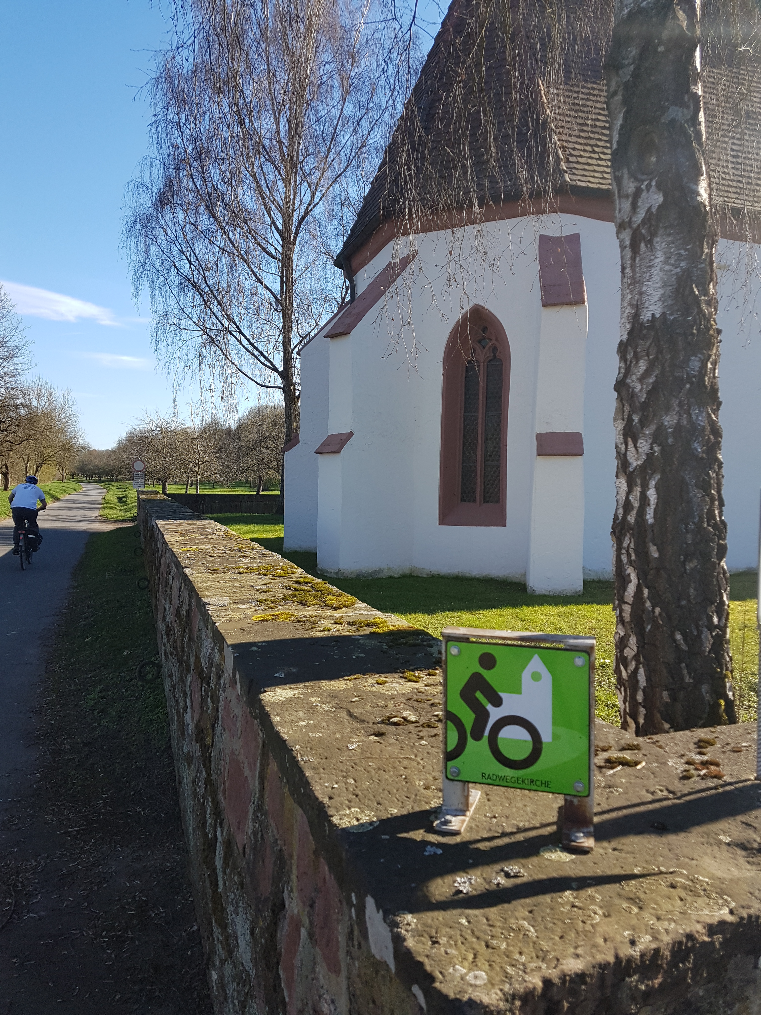 St.-Wolfgangs-Kapelle in Distelhausen Die Wolfgangskapelle ist als Radwegekirche ausgewiesen